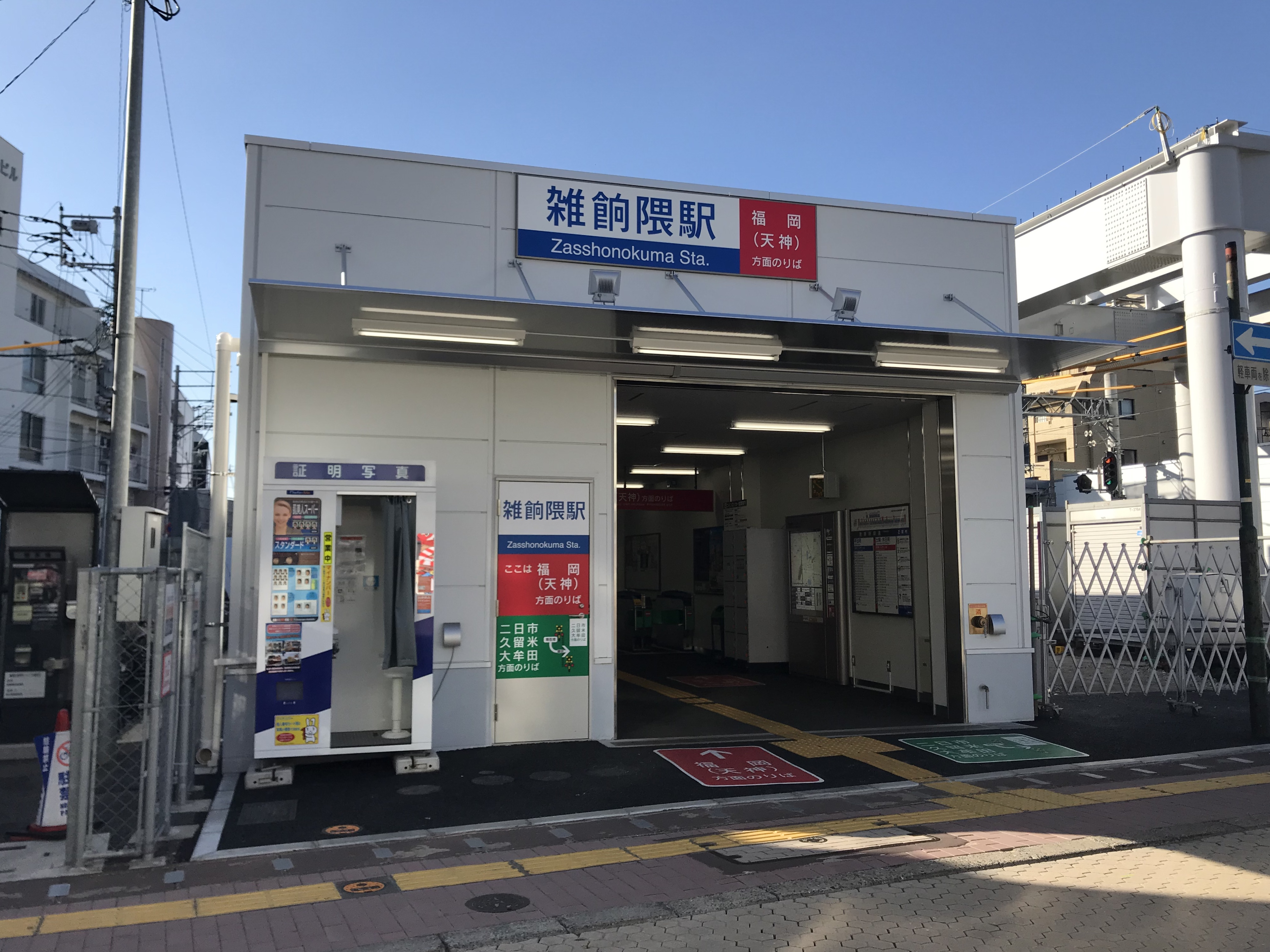 雑餉隈駅・天神方面ホームの入り口